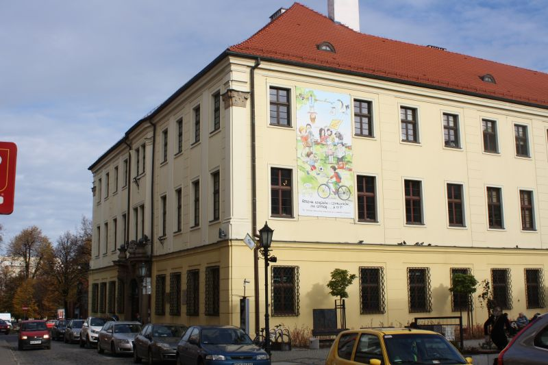 ul. Franciszkańska 18